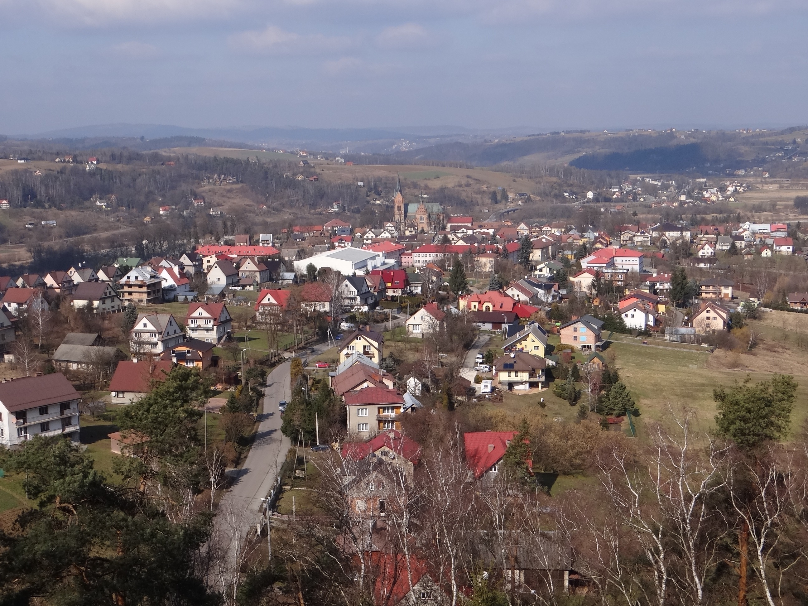 Ciężkowice, widok ogólny ze Skałki z krzyżem